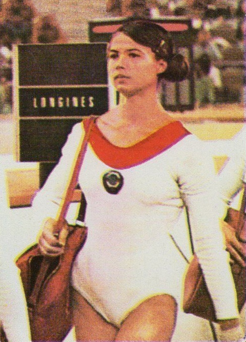 FIGURINA PANINI CAMPIONI DELLO SPORT ANNO 1973/74 N. 184 GINNASTICA